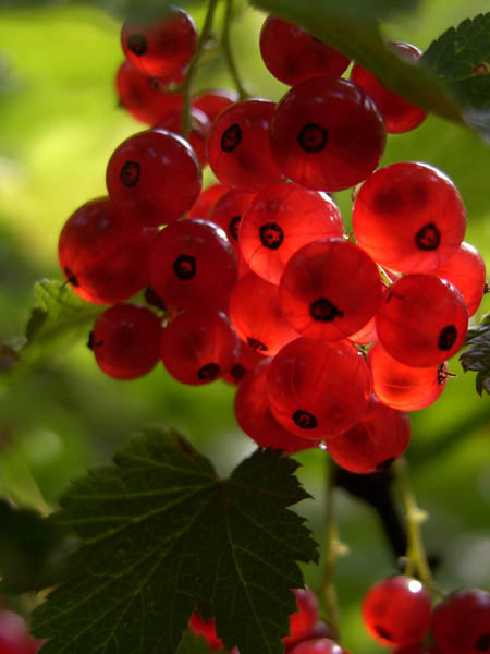 Rote Johannisbeere (Ribes rubrum)